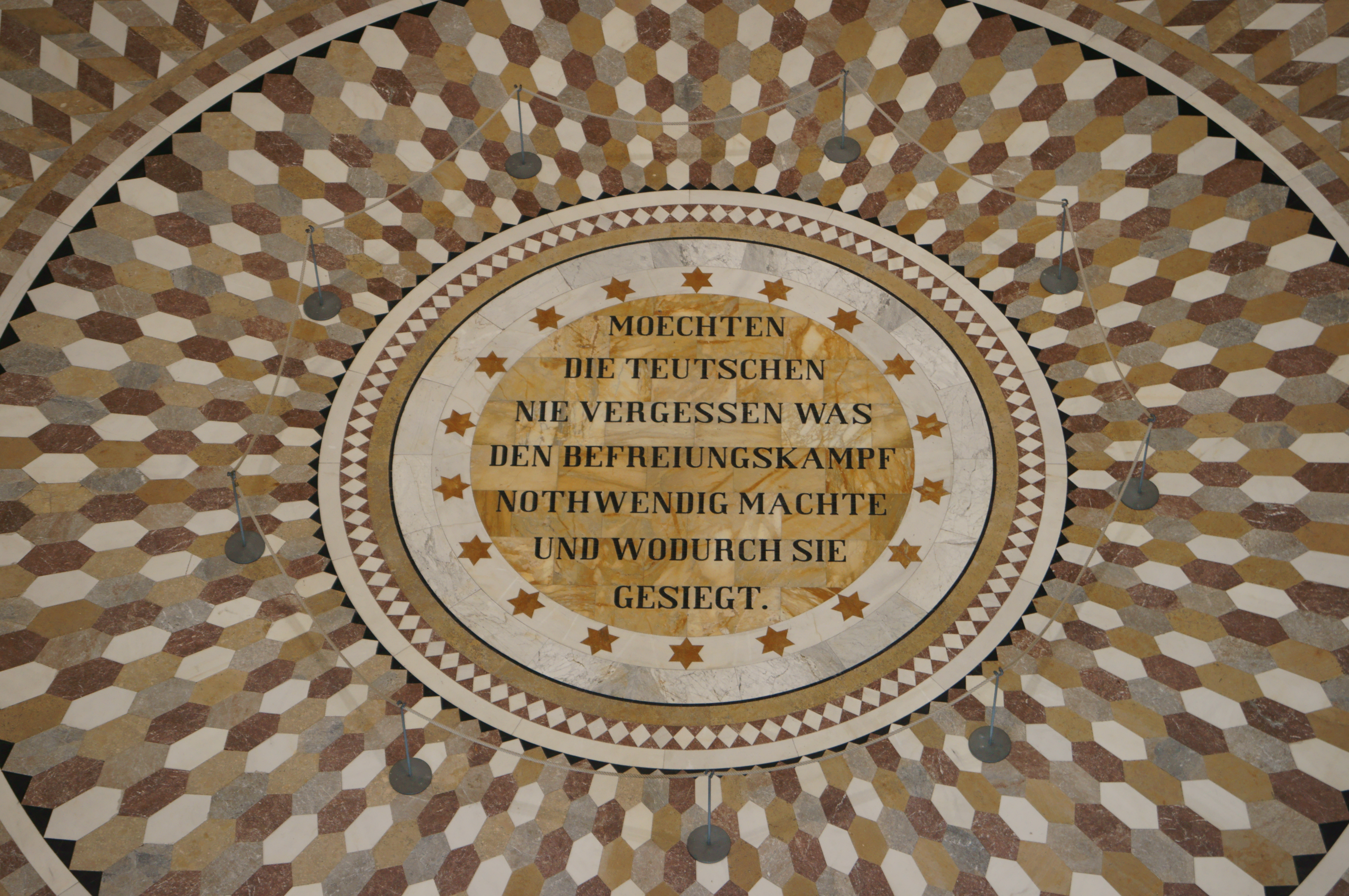 Bodeninschrift der Befreiungshalle